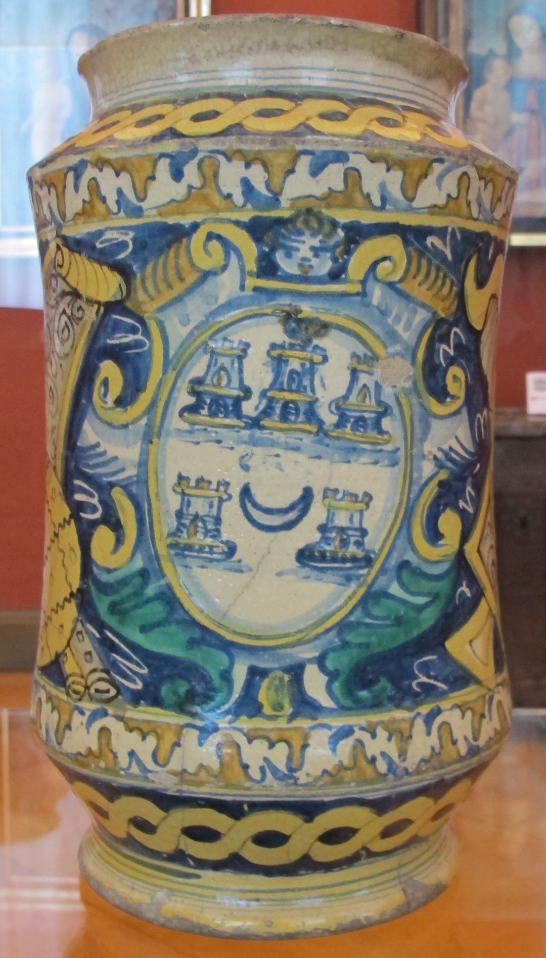 Sciacca o palermo, albarello con stemma e ornamento a trofei, 1600-1650 ca